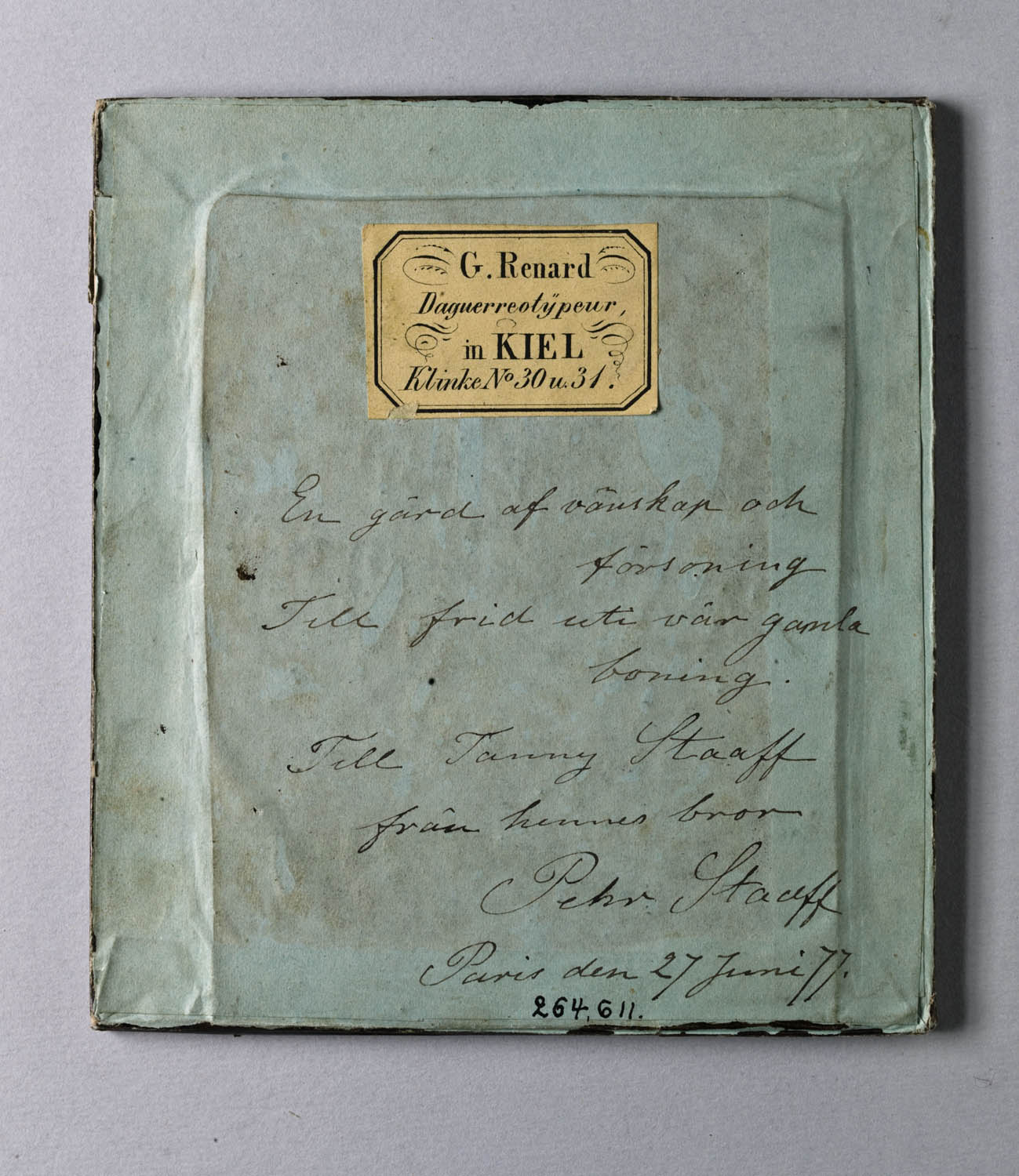 Knäbild av sittande man. Dagerrotyp / daguerreotyp i ram av sidenpressat papper under glaset, guldpapperslist utanpå detsamma. På baksidan etikett med tryck: "G.Renard/ Daguerreotypeur/ in Kiel/Klinke No 30 u. 31." Handskriven text: "En gärd af vänskap och försoning/Till frid uti vår gamla boning./Till Fanny Staaf/från hennes bror/Pehr Staaff/Paris den 27 Juni 77." Nordiska museet inv.nr 264611